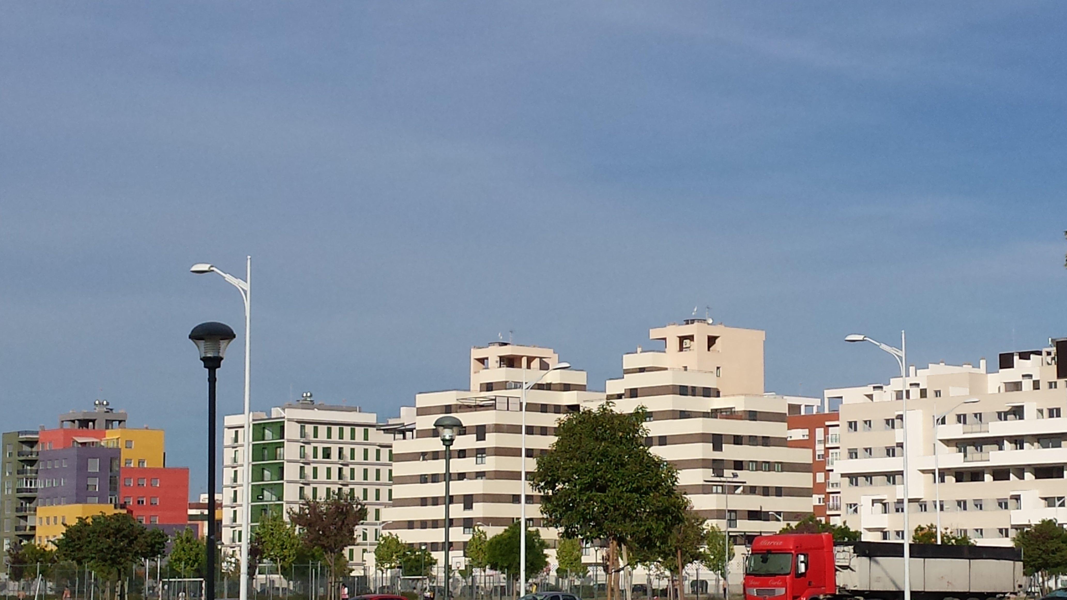 Barrio Imaginalia. Albacete